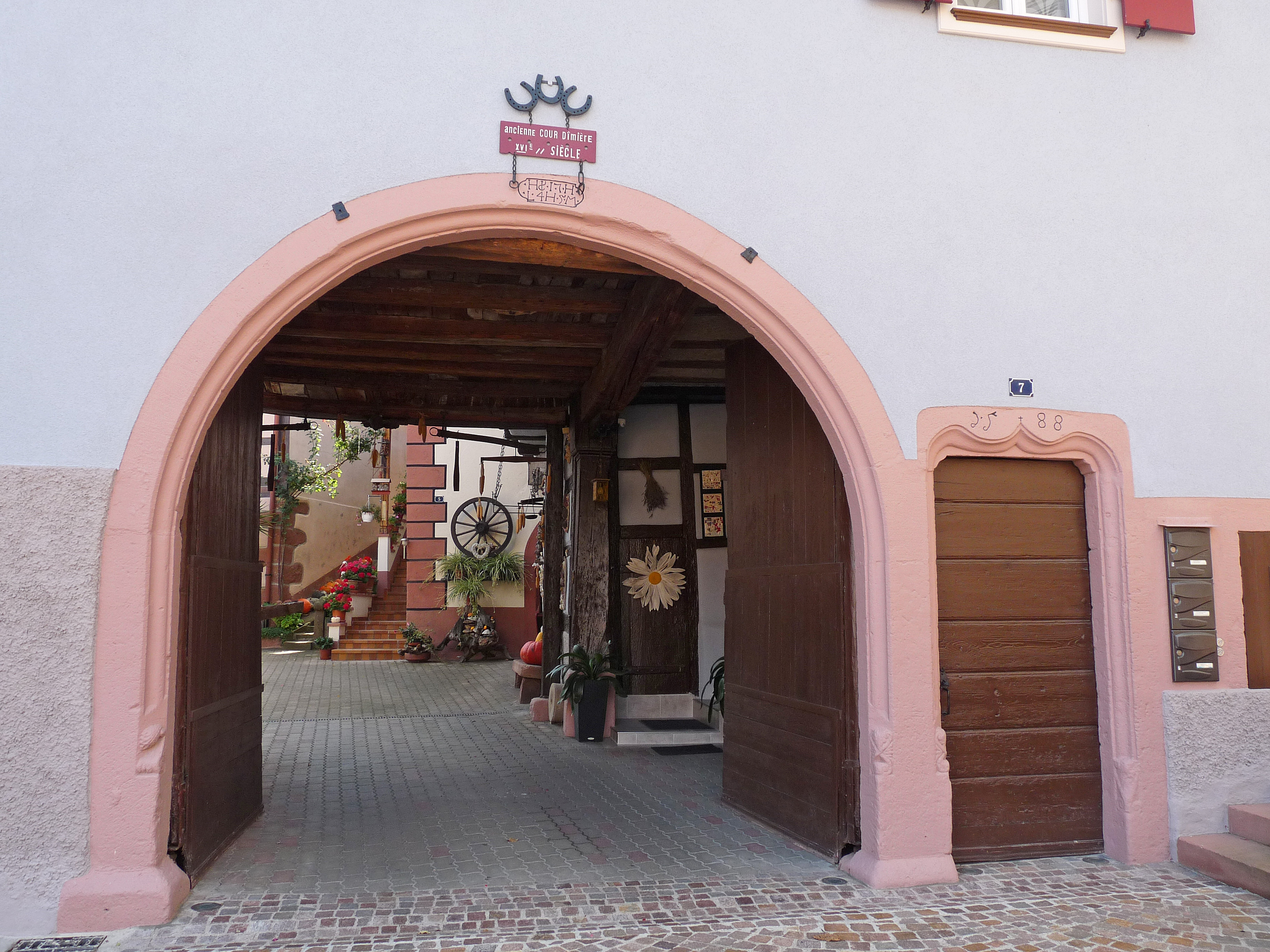 Orschwiller (Bas-Rhin) : ancienne cour dîmière (1588)